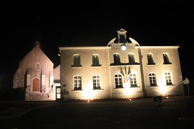 La mairie de Santenay 41 éclairée la nuit.